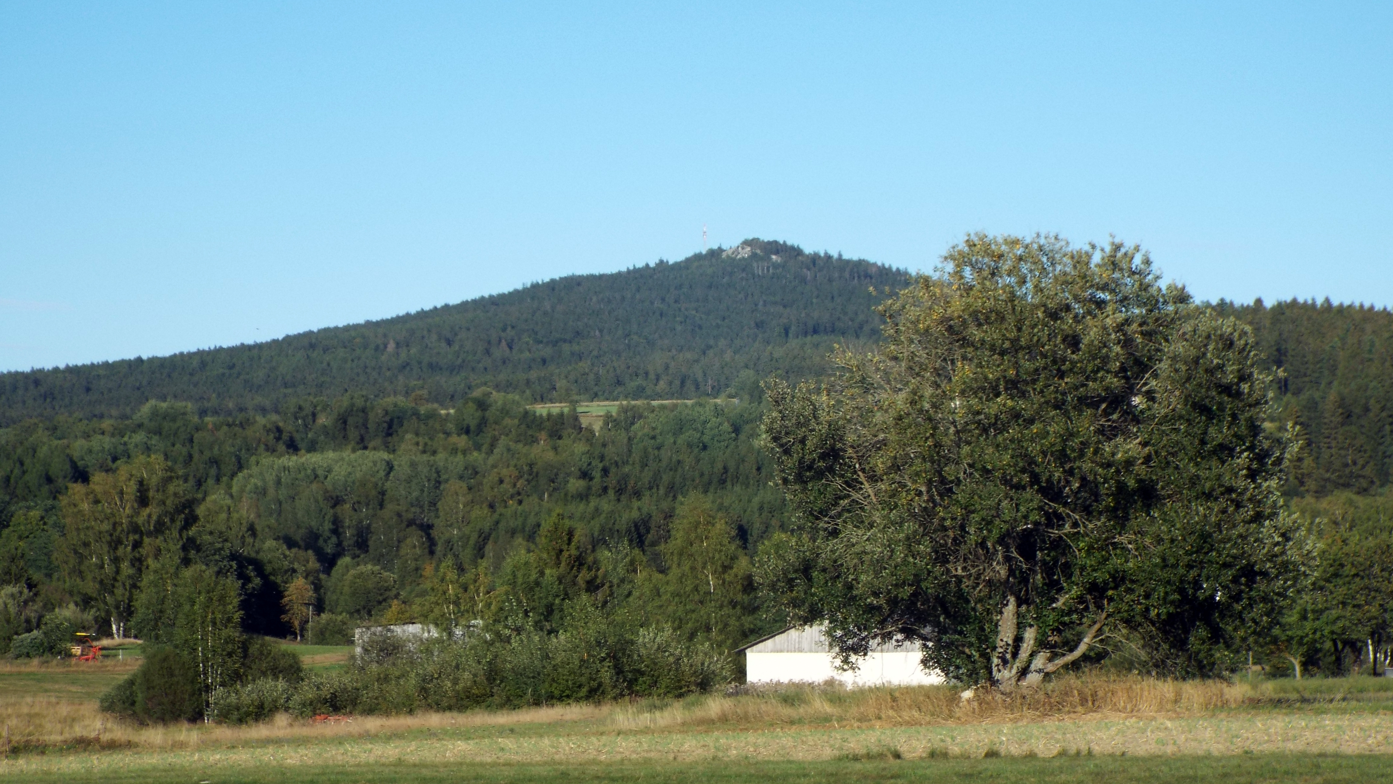 Foto von der Kösseine, gesehen von Nagel, selbst fotografiert. Datum: 19. Mai 2006.